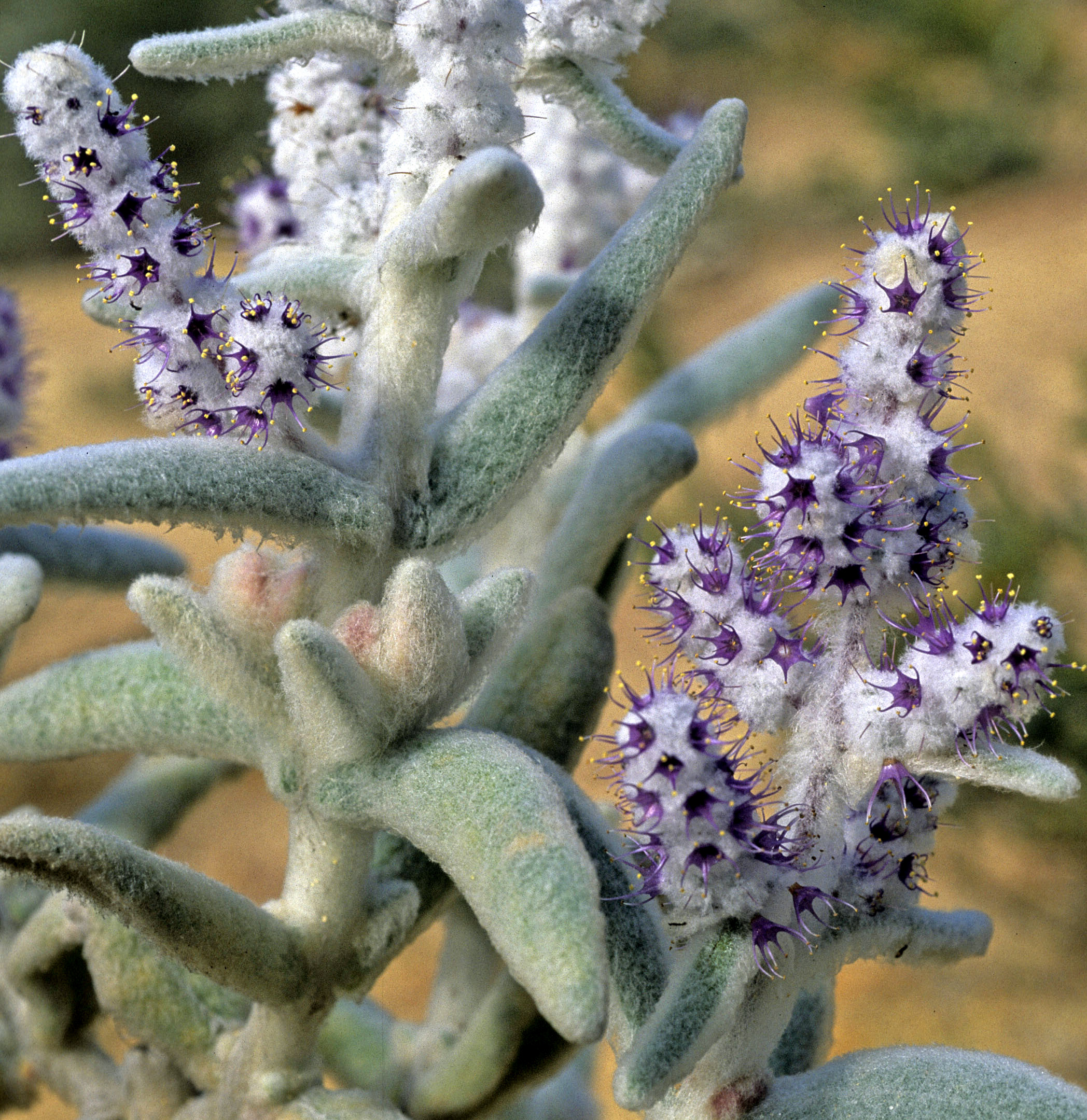 Lachnostachys verbasciflolia en el Kings Park and Botanic Garden de Perth, Western Australia.